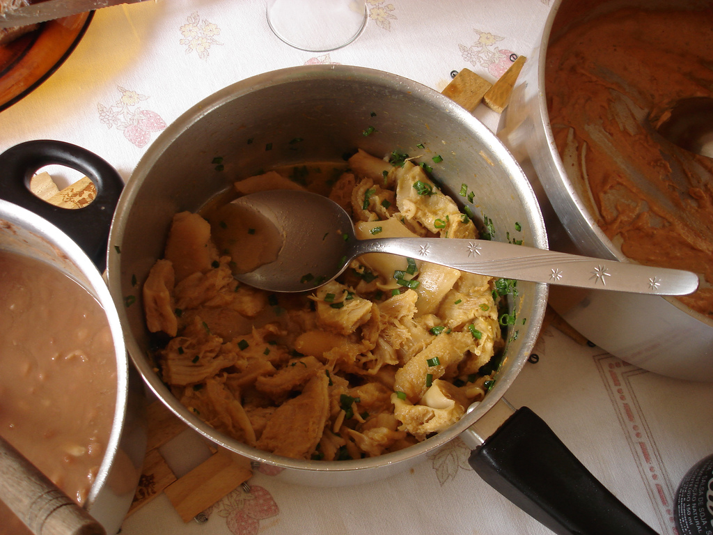 Dobradinha